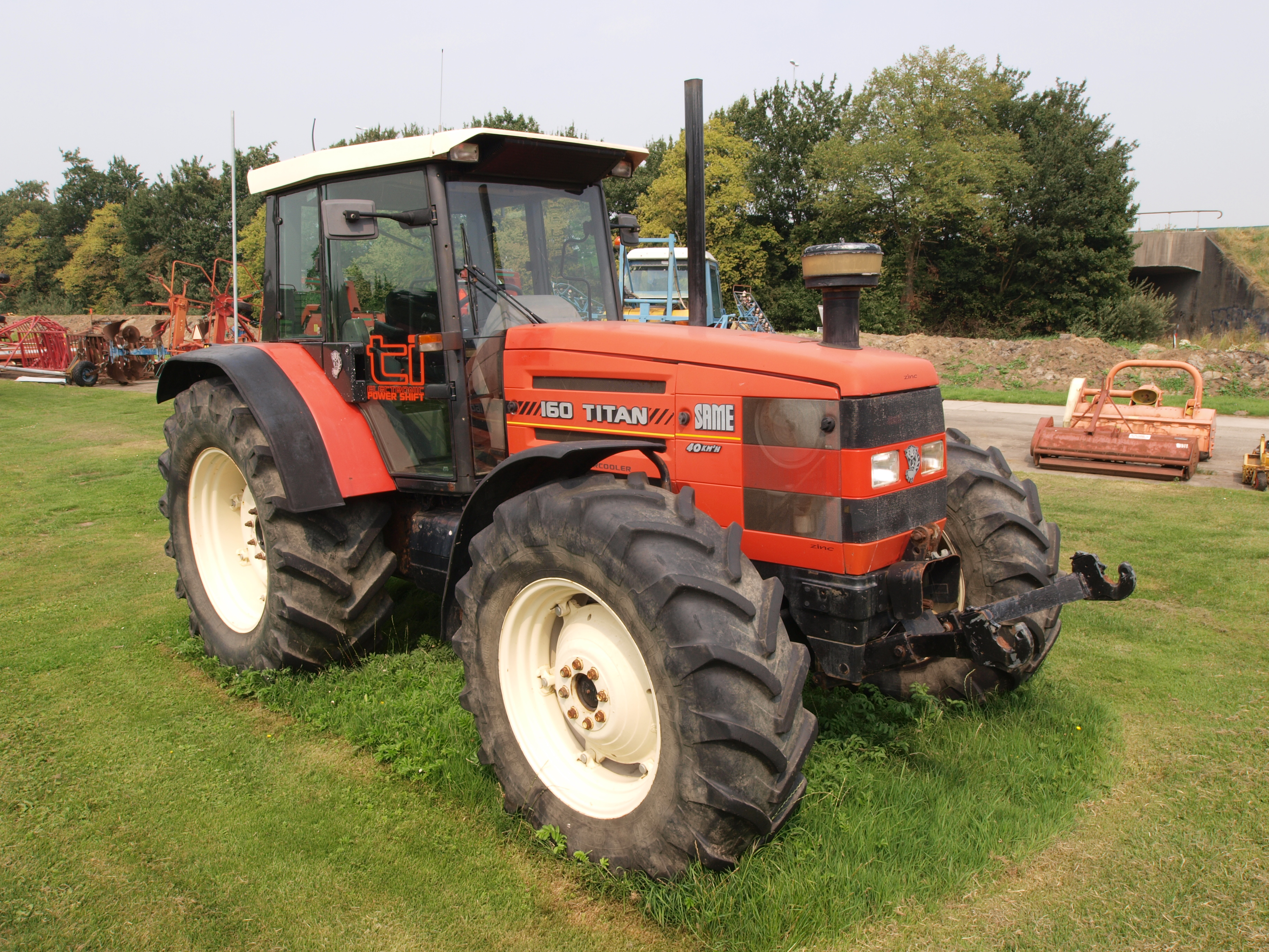 Same 160 Titan